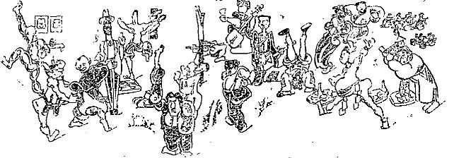 東京漫画会主催の第三回漫画祭で踊り狂う漫画家たち